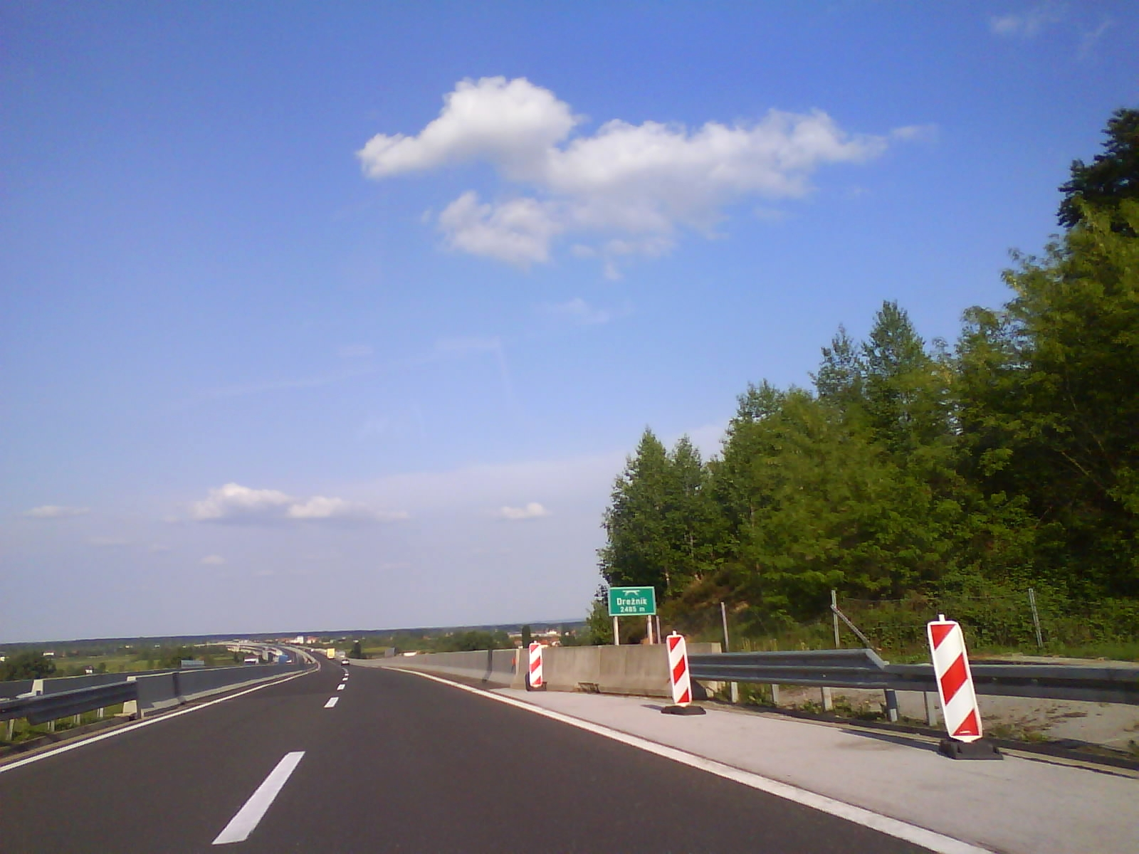 Vijadukt Drežnik